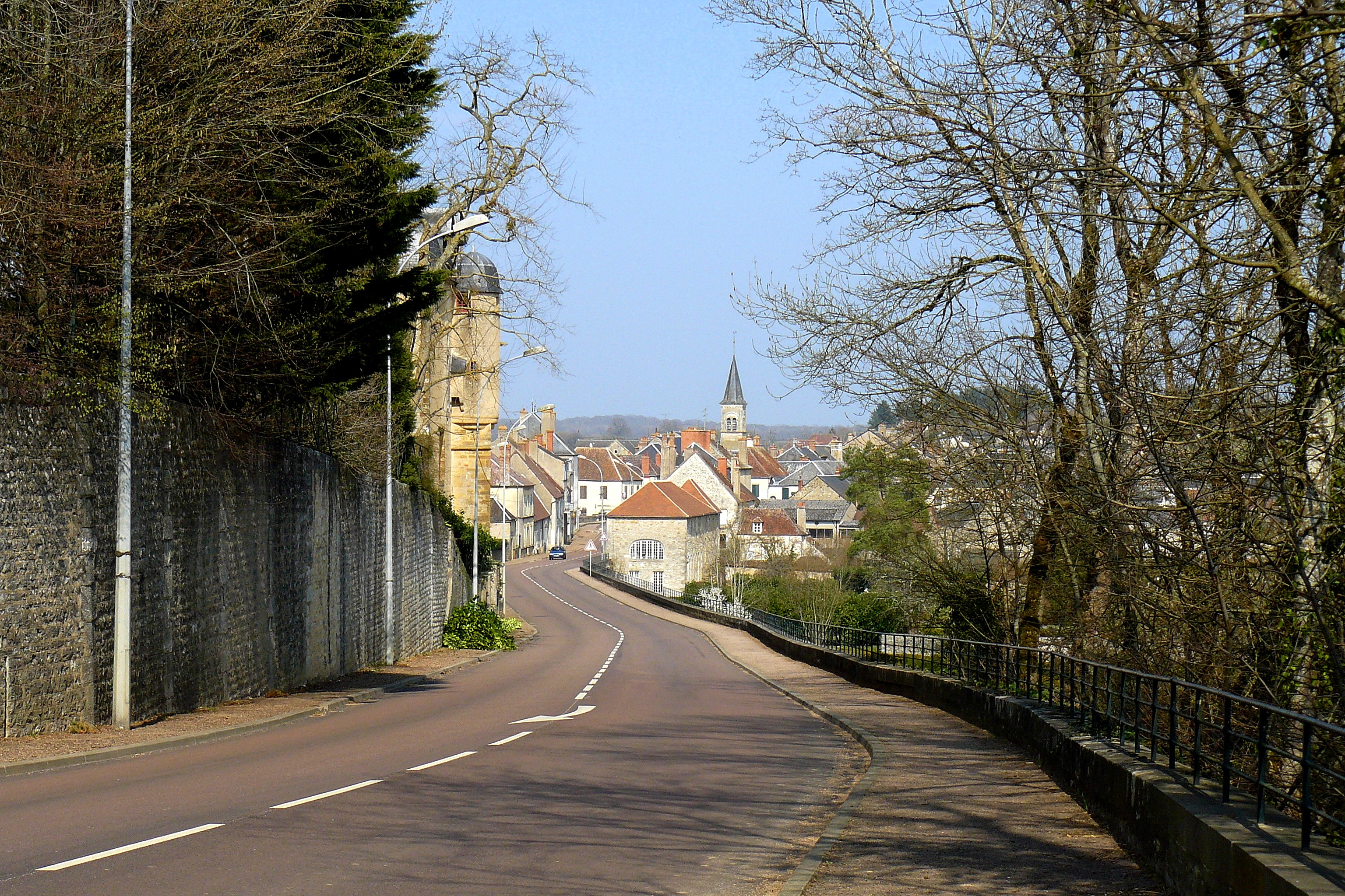 Châtillon-en-Bazois (Nièvre, France)